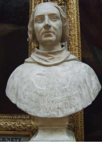 Depicted person: Jean de Vienne